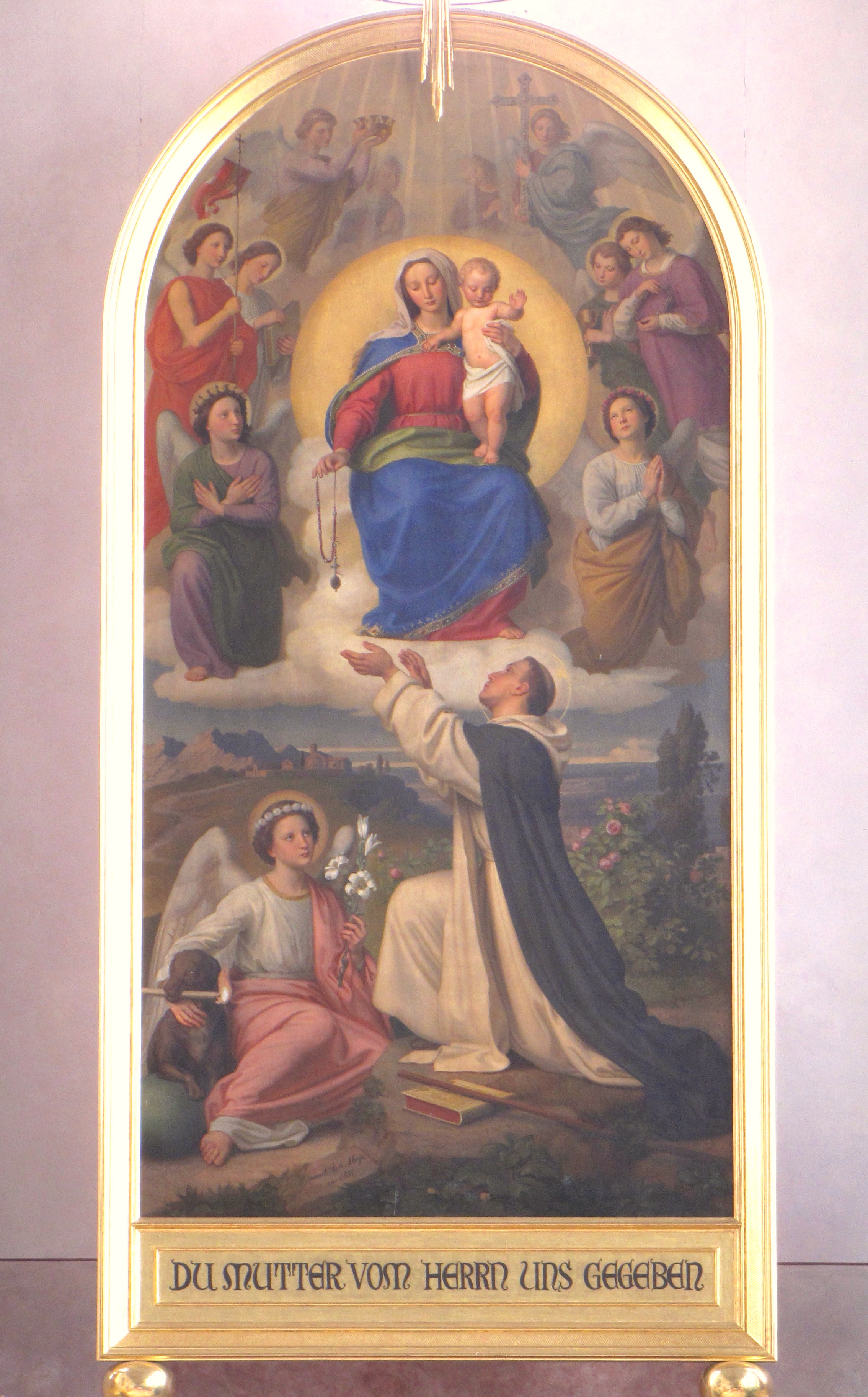 Hochaltarblatt von Andreas Mayr, 1858, in der Pfarrkirche von Unterthingau